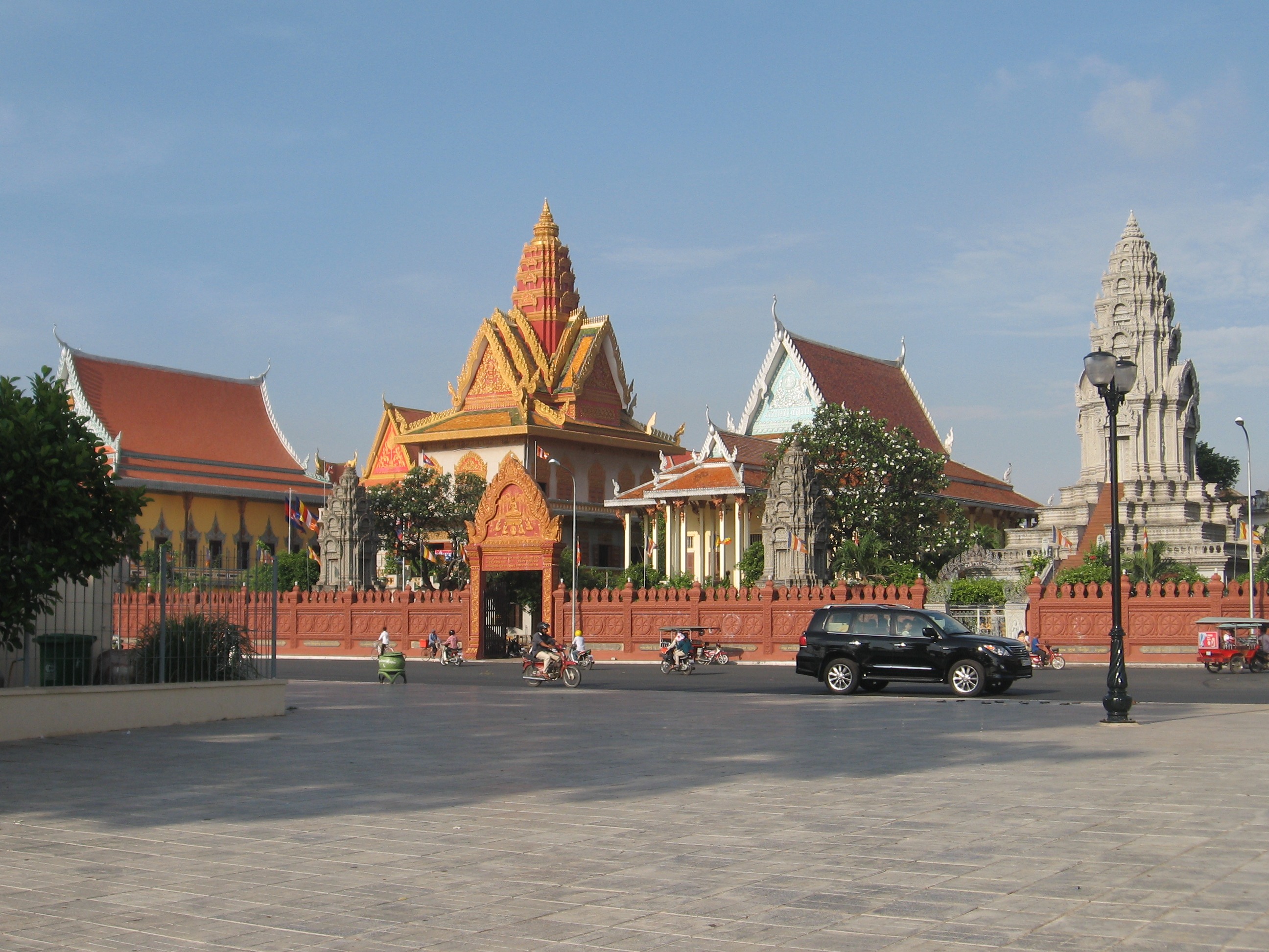 Chùa Campuchia